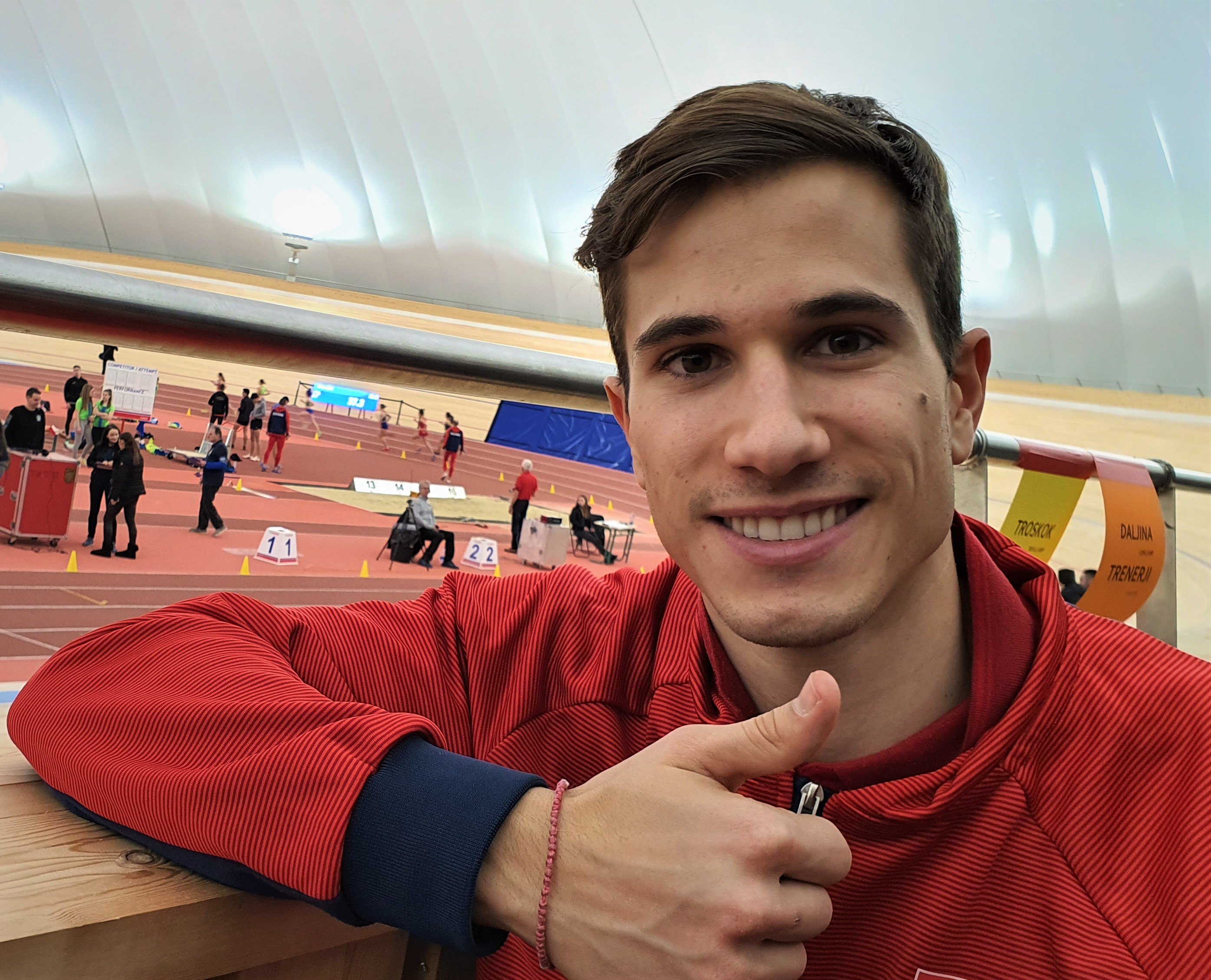 Ново Место